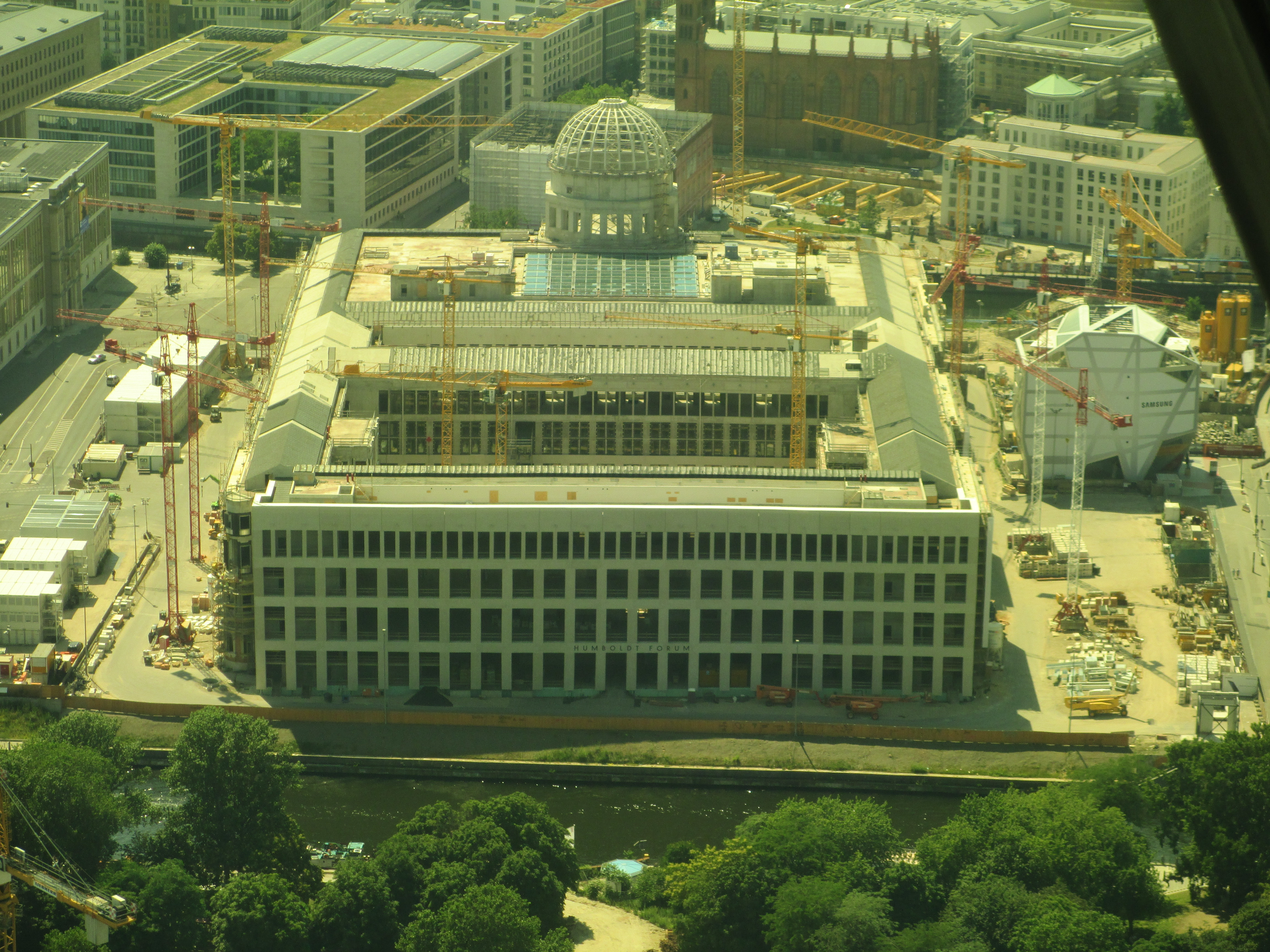 בניין הומבולדט פורום , 2016